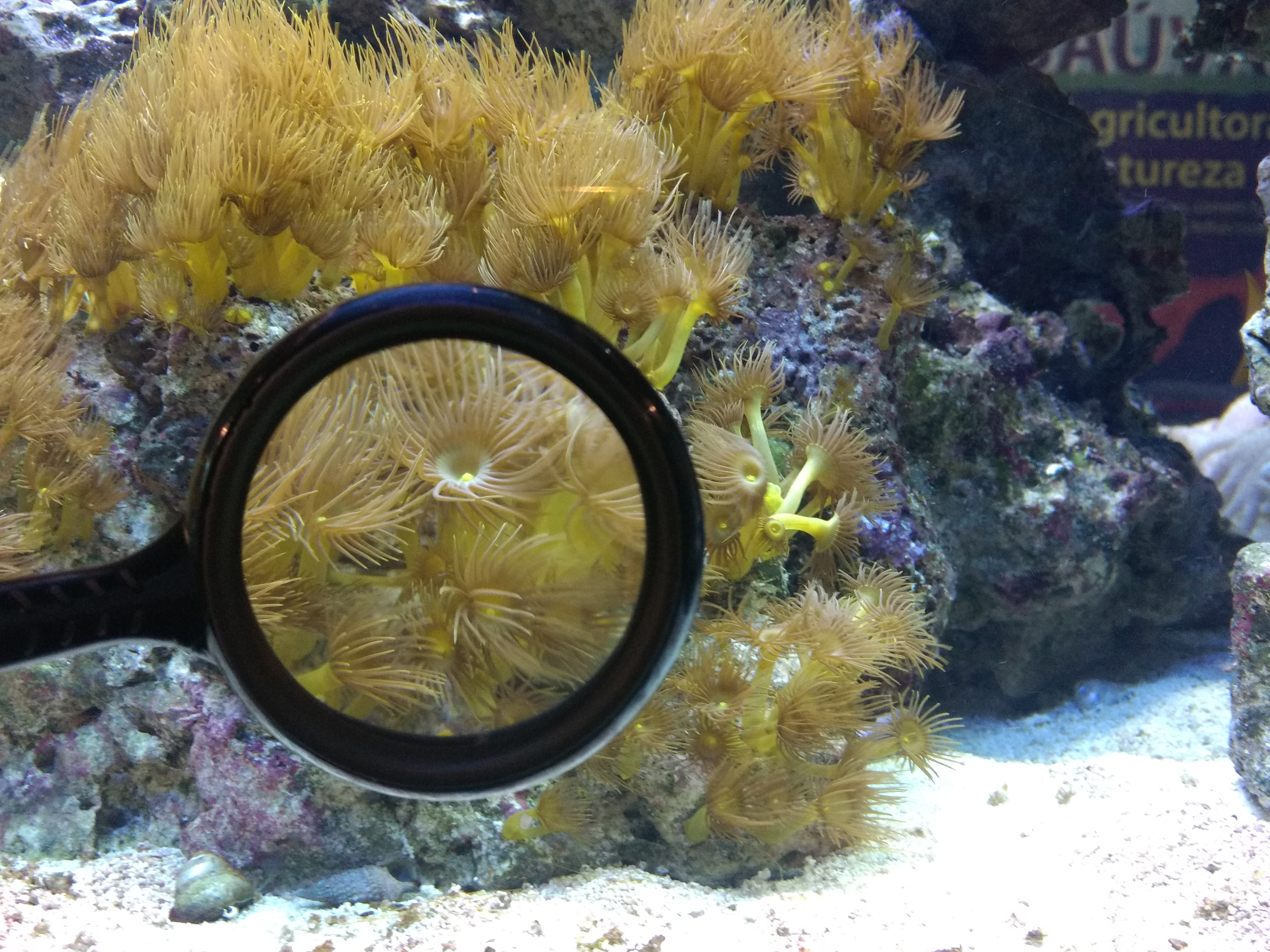 Catavento, aquário, coral, lupa. Sp.